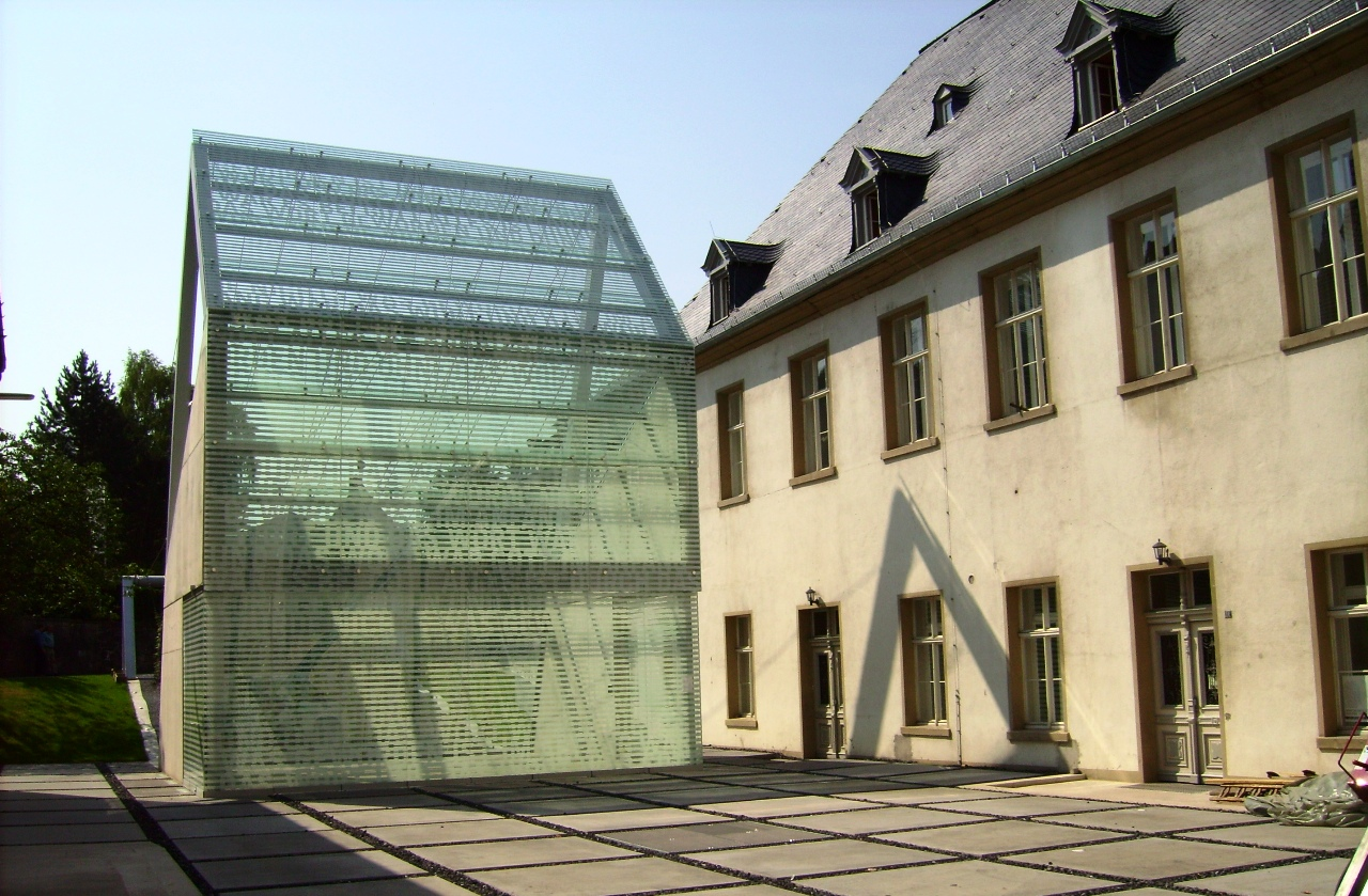 Kloster Wedinghaus (Glashaus)